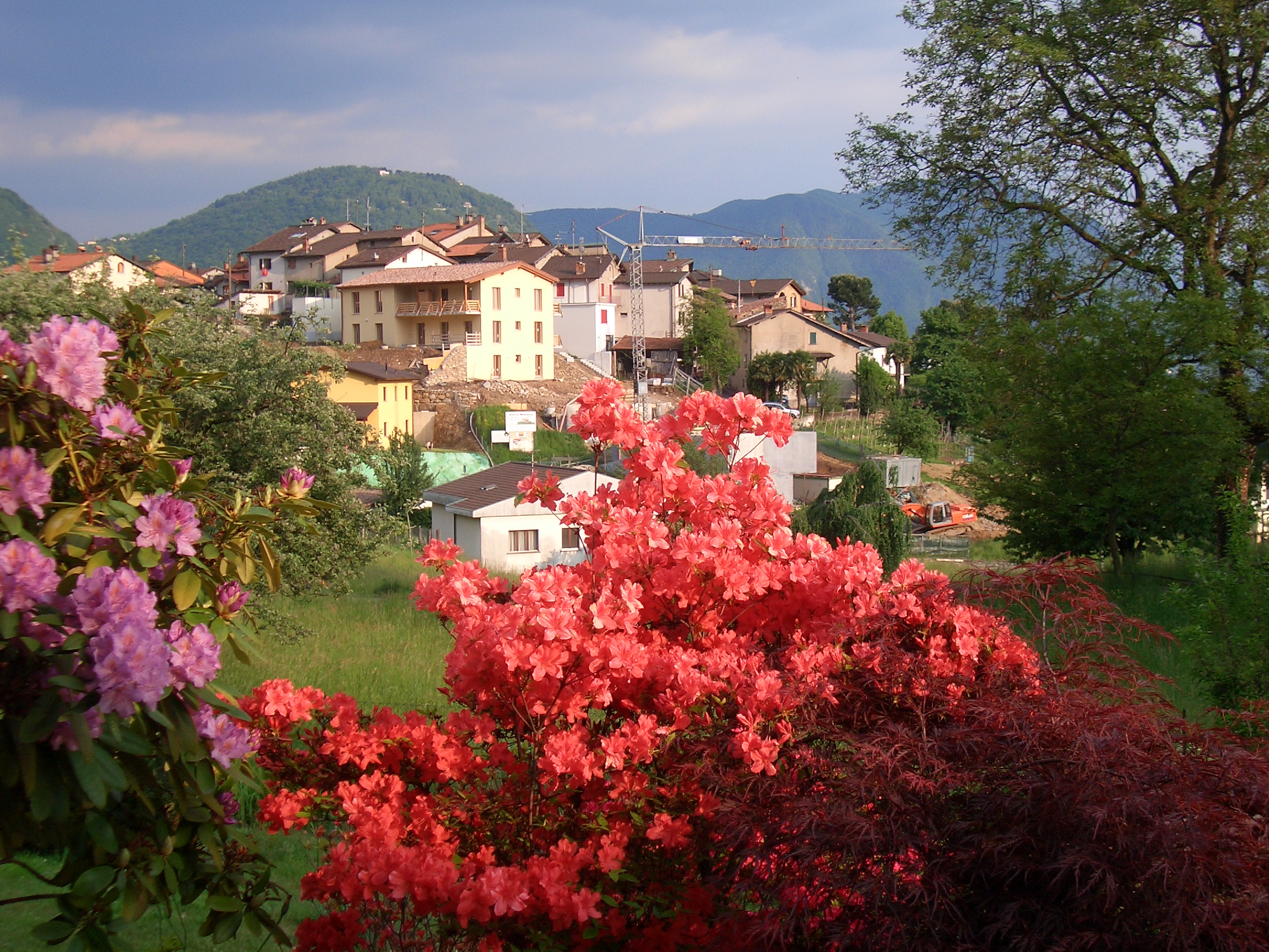 vista da Ca da Ronco